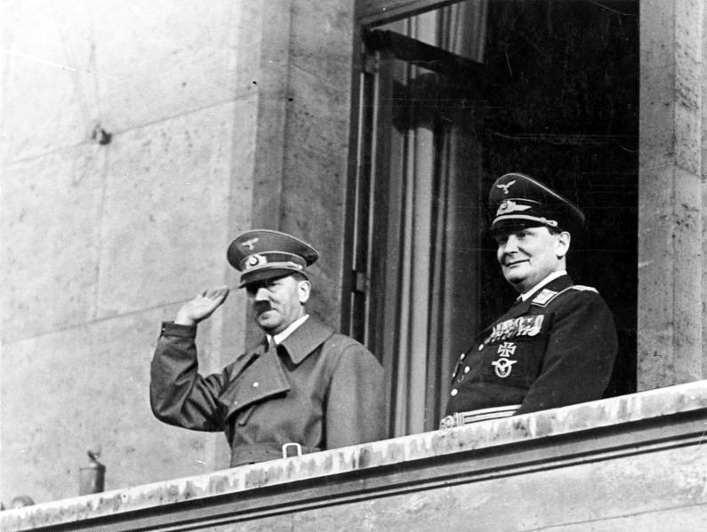 Berlin, Adolf Hitler und Hermann Göring Die Reichshauptstadt Berlin empfing am Mittwochnachmittag den Führer der geeinten deutschen Nation mit einer überwältigenden Begeisterung. Millionen Volksgenossen säumten den Weg, den der Führer nahm, um ihn mit ihren Jubelrufen zu begrüßen. Nach der Triumphfahrt durch das Spalier der Millionen mußte sich dann der Führer und Reichskanzler im Laufe des Abends immer wieder den jubelnden Hunderttausenden auf dem Wilhelmplatz zeigen, die ihm und seinem Generalfeldmarschall begeisterte Dankeskundgebungen bereiteten. Scherl Bilderdienst 16.3.38 [Berlin.- Adolf Hitler und Hermann Göring auf Balkon der Reichskanzlei nach der Rückkehr aus Österreich]